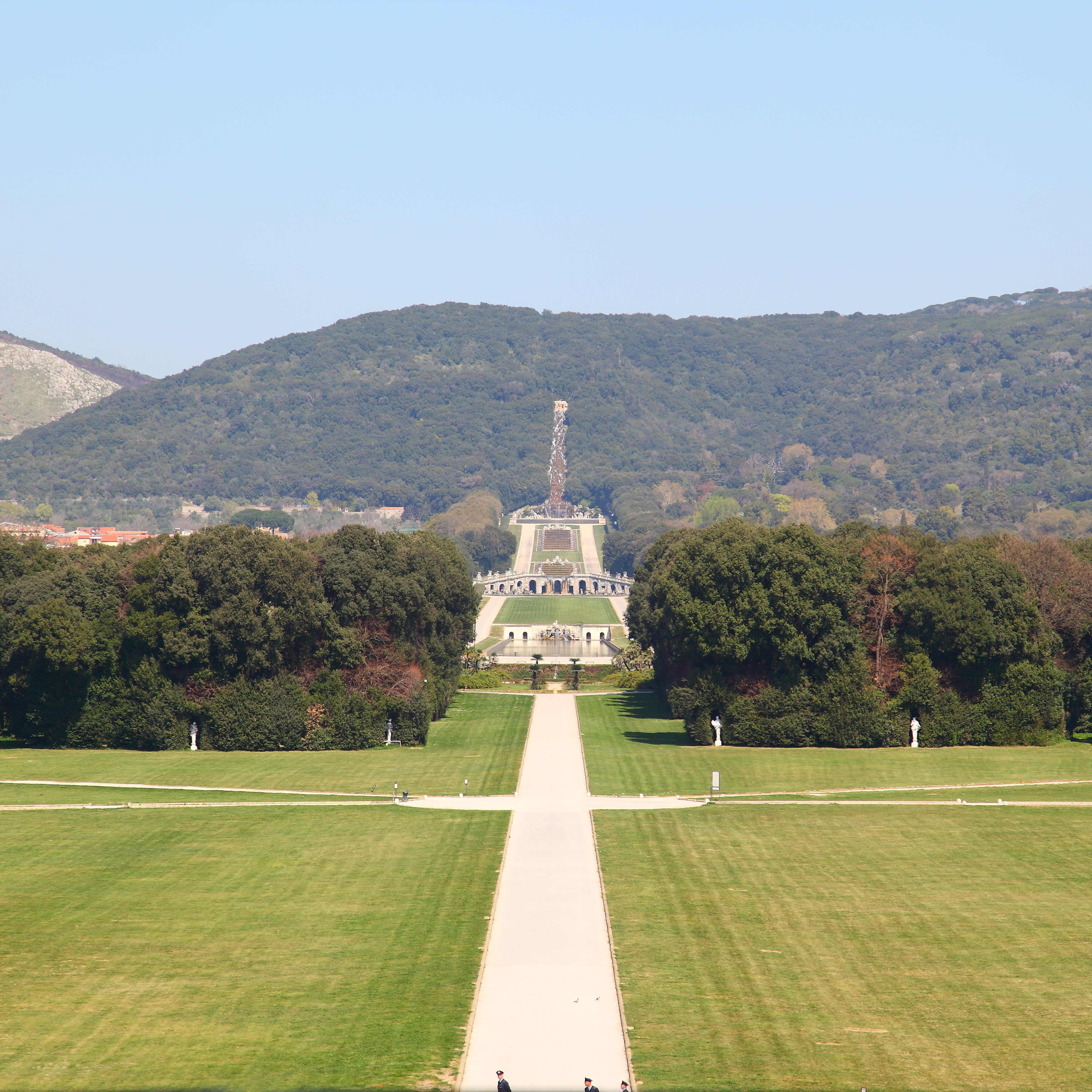 Le cascate della Reggia che scendono dai colli tifatini in una veduta da Palazzo Reale